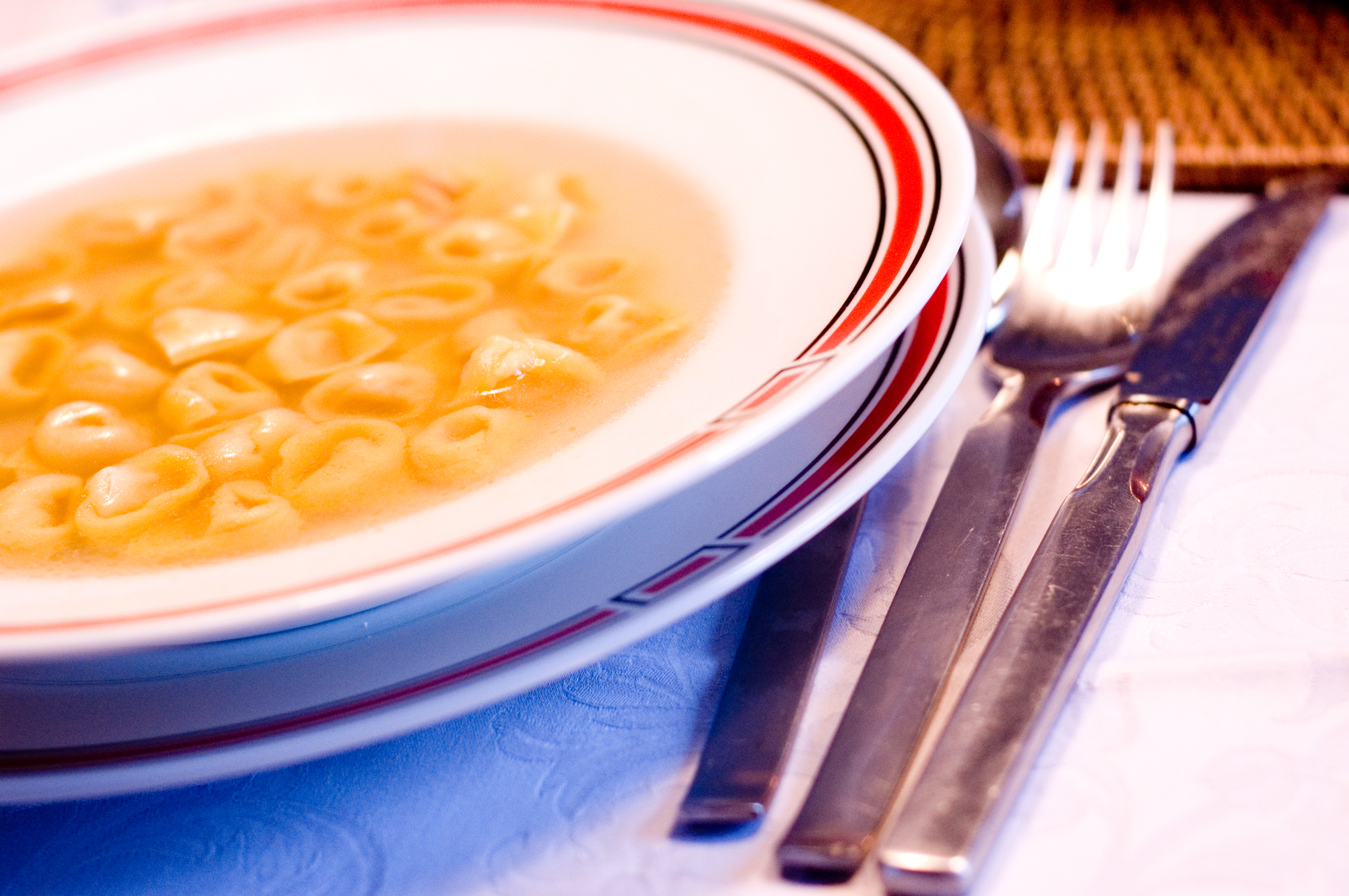 I tortellini in brodo.